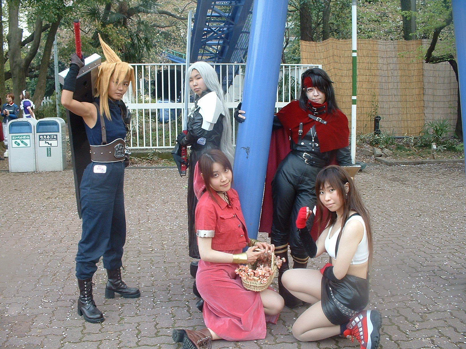 Grupo de cosplayers vestidos de Cloud, Sephiroth, Vincent, Aeris y Tifa.